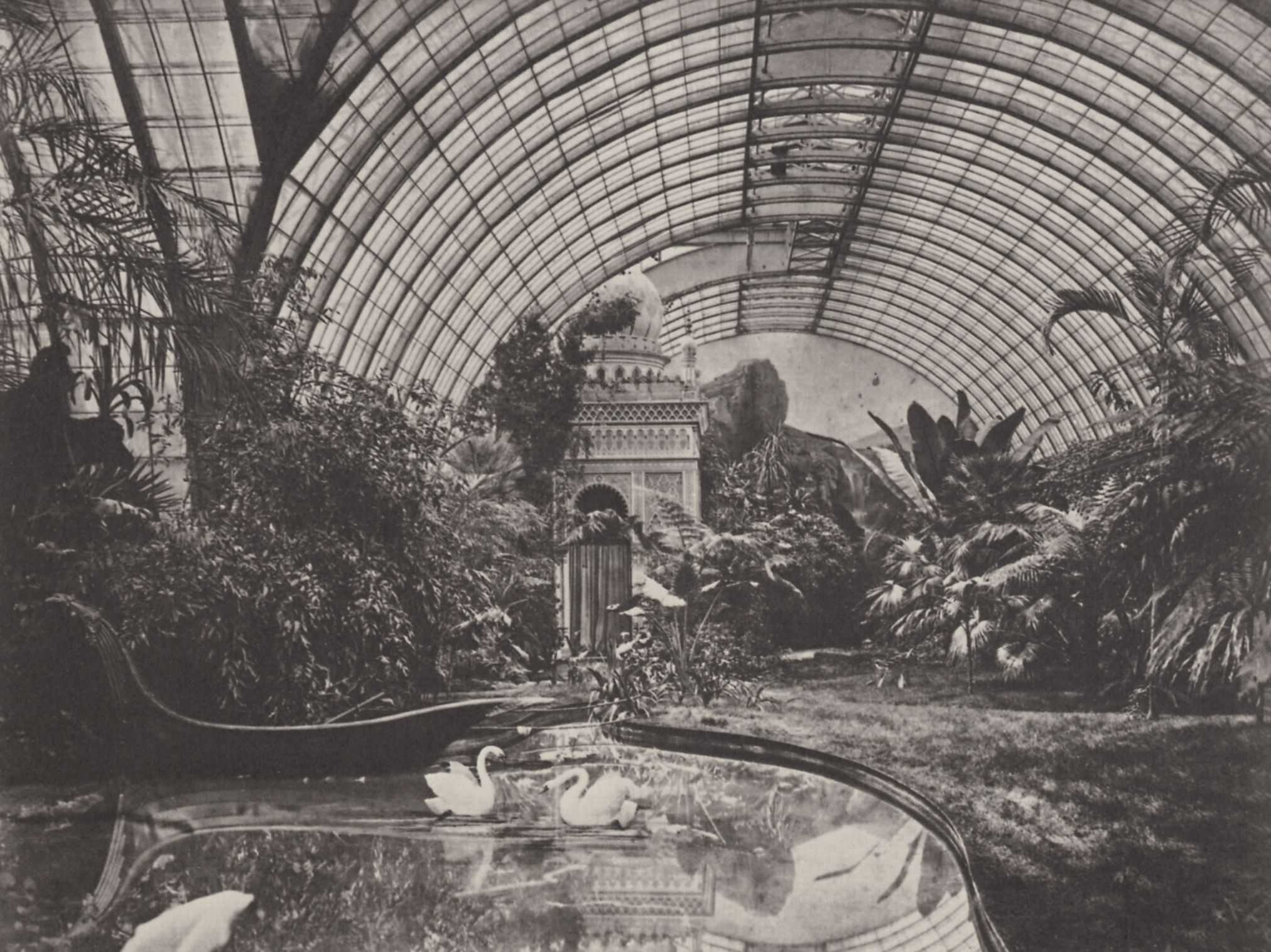 Albert, Joseph: München, Residenz – Wintergarten König Ludwigs II., nach Westen